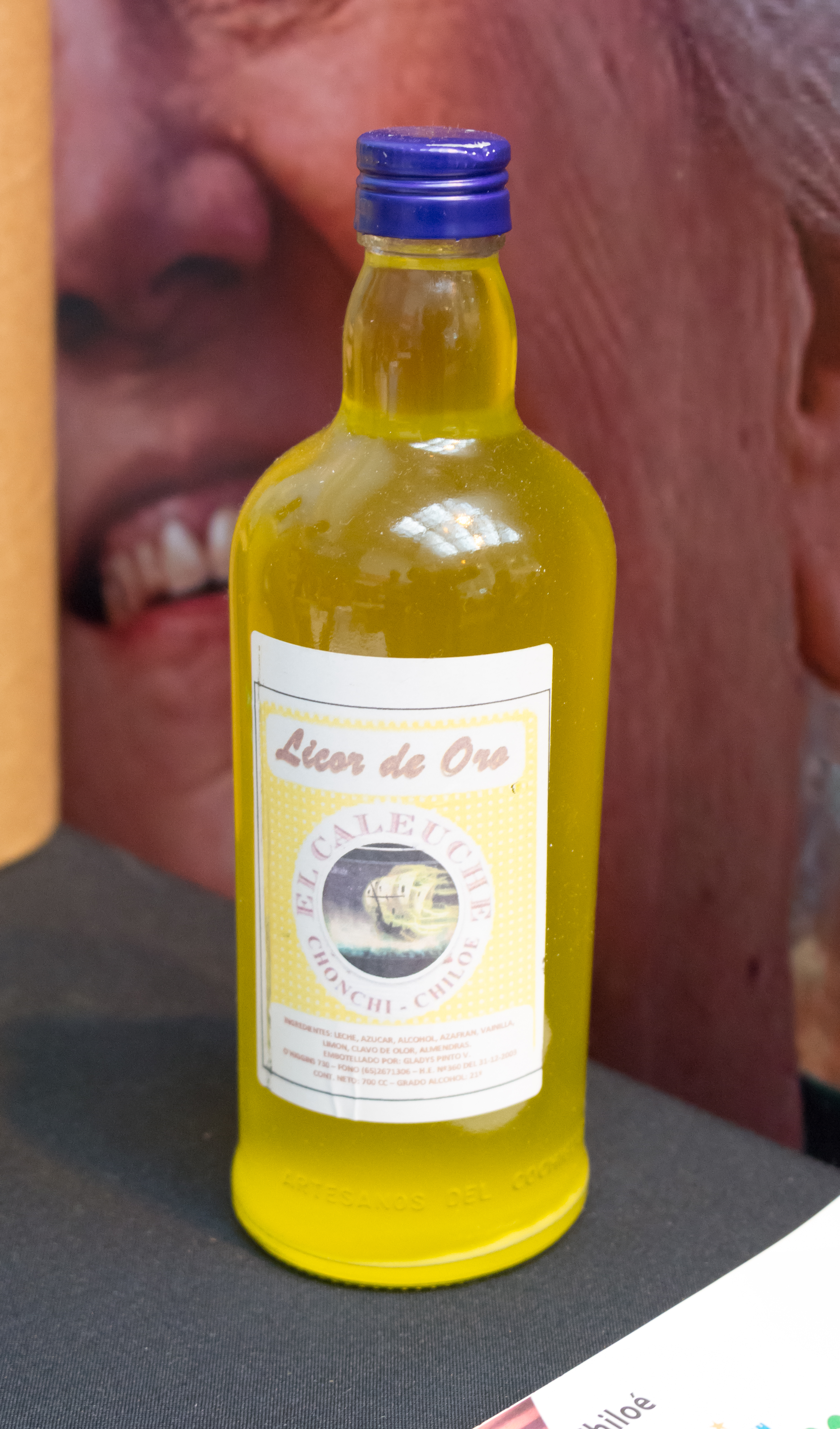 Feria vacaciones tercera edad Sernatur 2019, Providencia, Santiago, Chile.